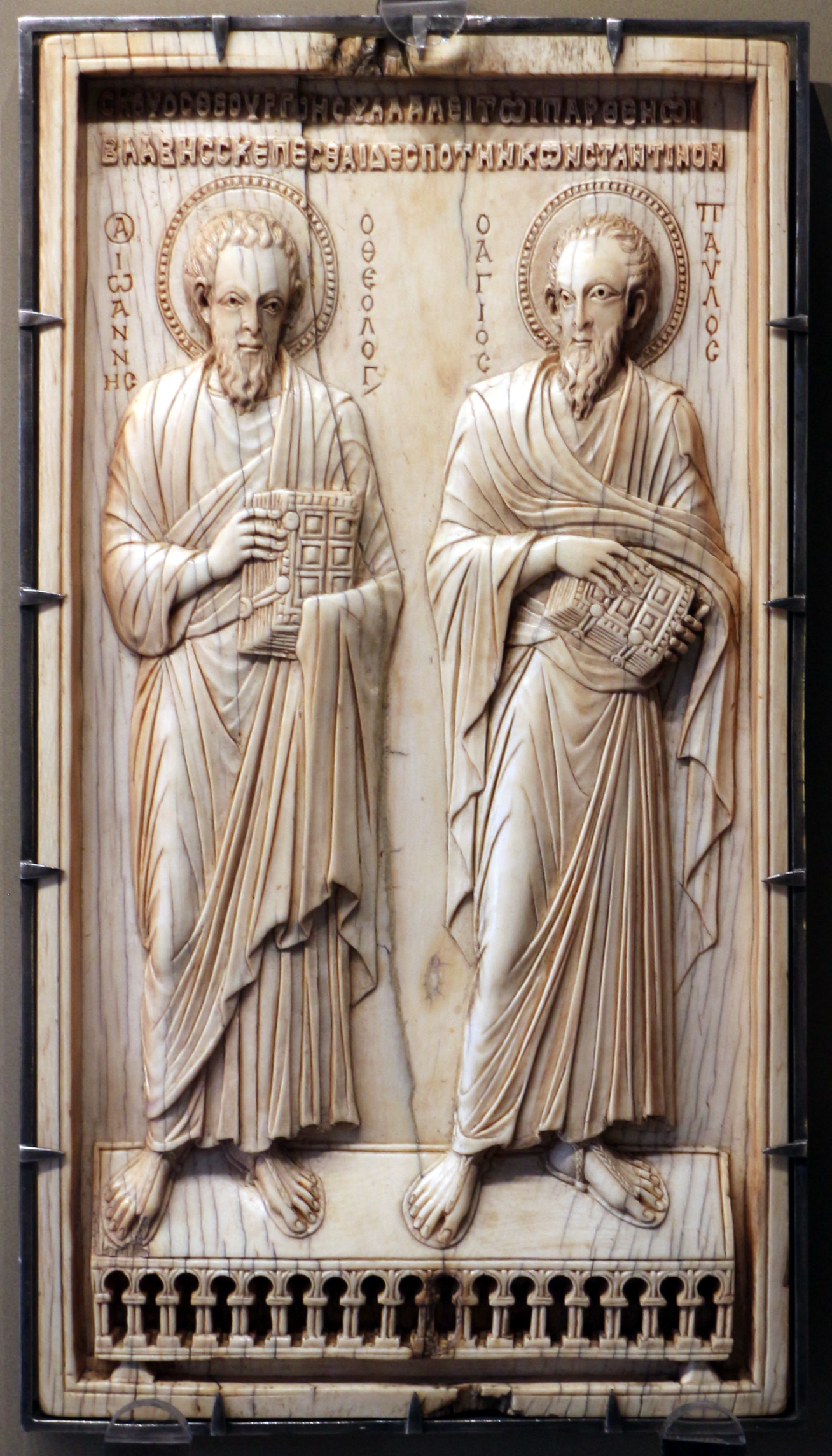 Museo Archeologico Nazionale This is a photo of a monument which is part of cultural heritage of Italy.